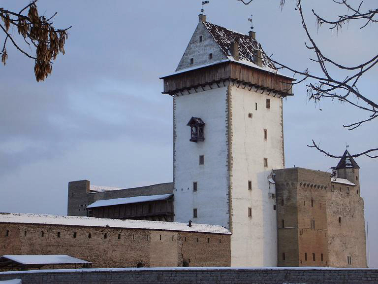 Zamek w Narwie, Estonia. 2006. Autor: Sihi Sihi 20:13, 14 mar 2006 (CET)sihi